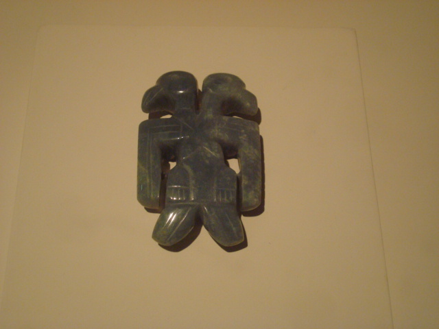 Colgante avimorfo bicéfalo de jadeíta. Ave con dos cabezas trabajada por la técnica de aserramiento. Las plumas de las alas y su cola bifurcada, han sido logradas a base de líneas incisas, así como sus garras. Pieza trabajada en bulto. 500-800 EC.